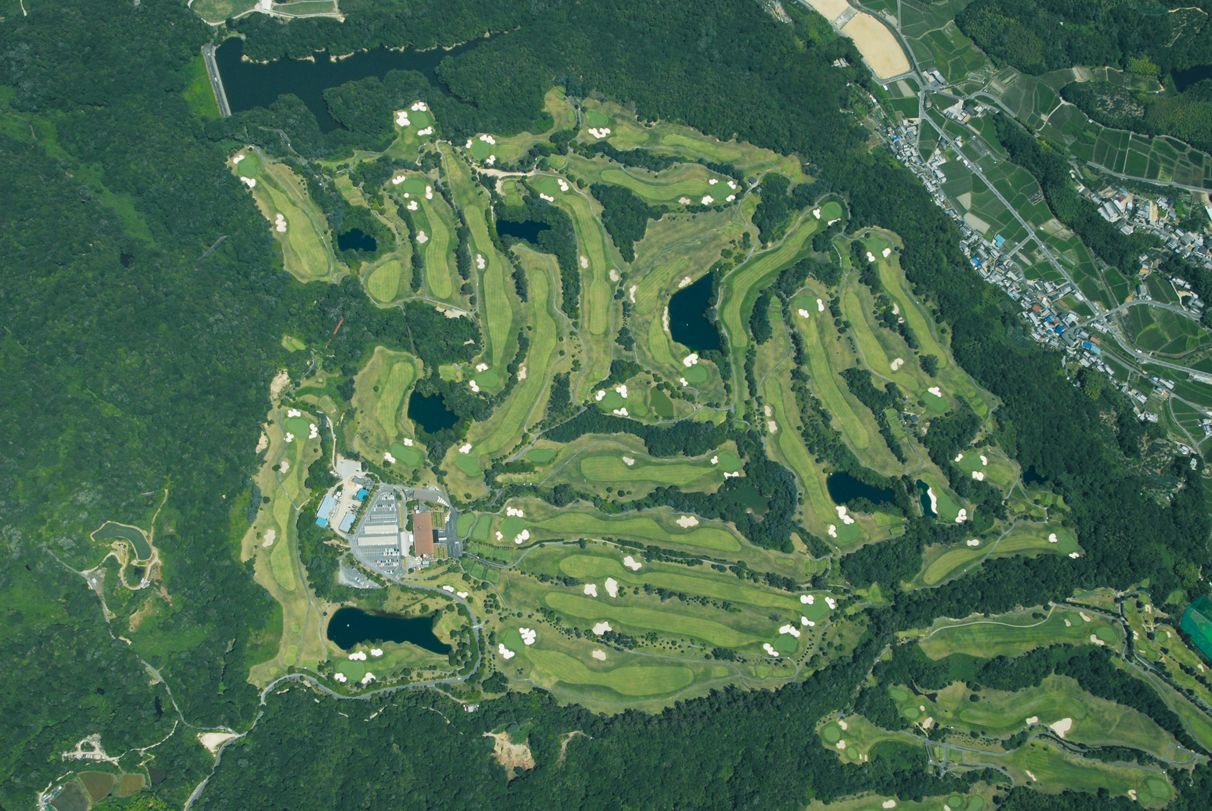 大阪府堺市南区の泉ヶ丘カントリークラブの全コースを航空写真に撮りました。